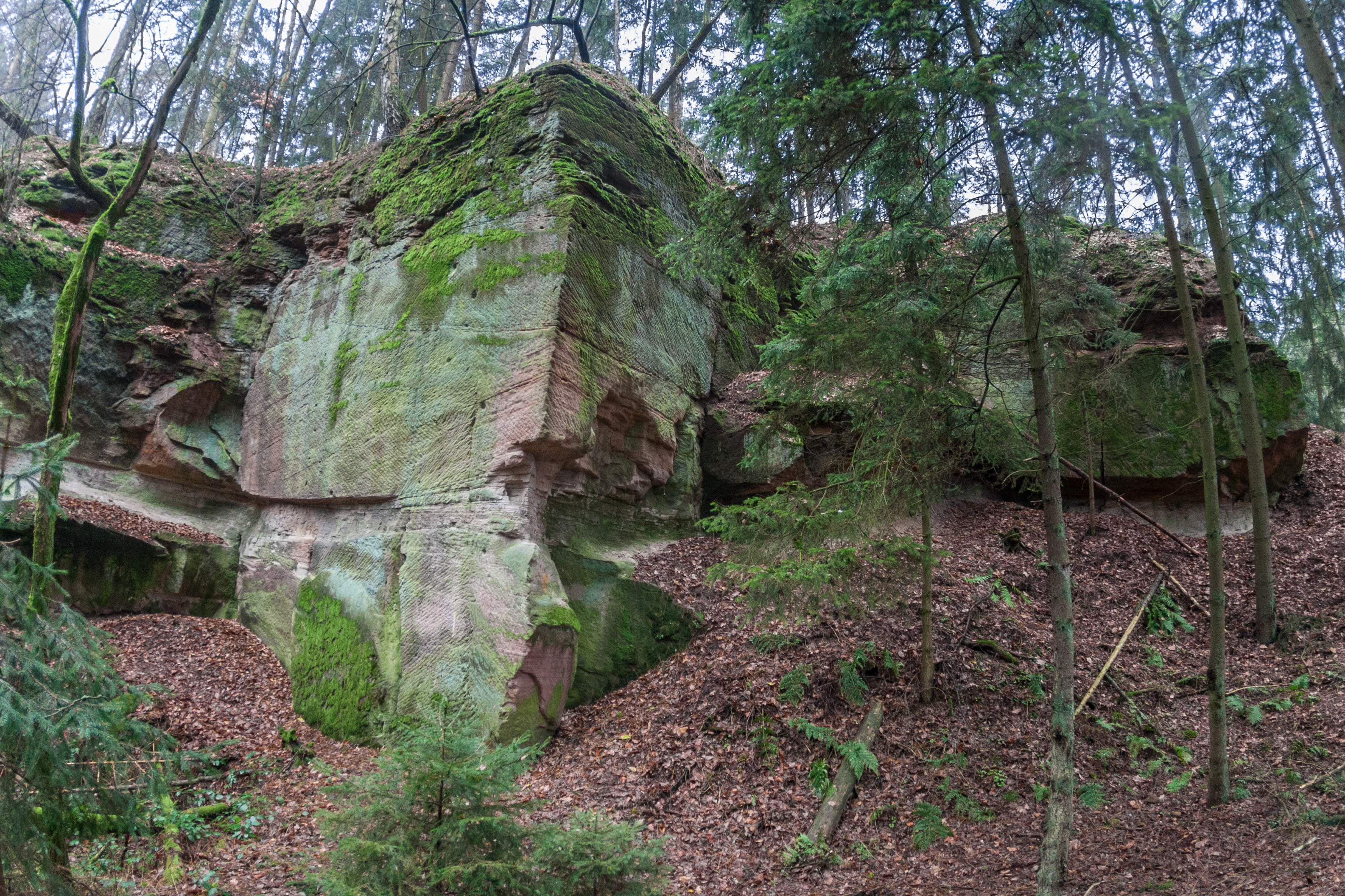 Steinbrüche im Fürther Stadtwald